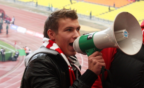 Сергей Паршивлюк на фанатском секторе "Спартака" на матче с "Зенитом". 2012 год